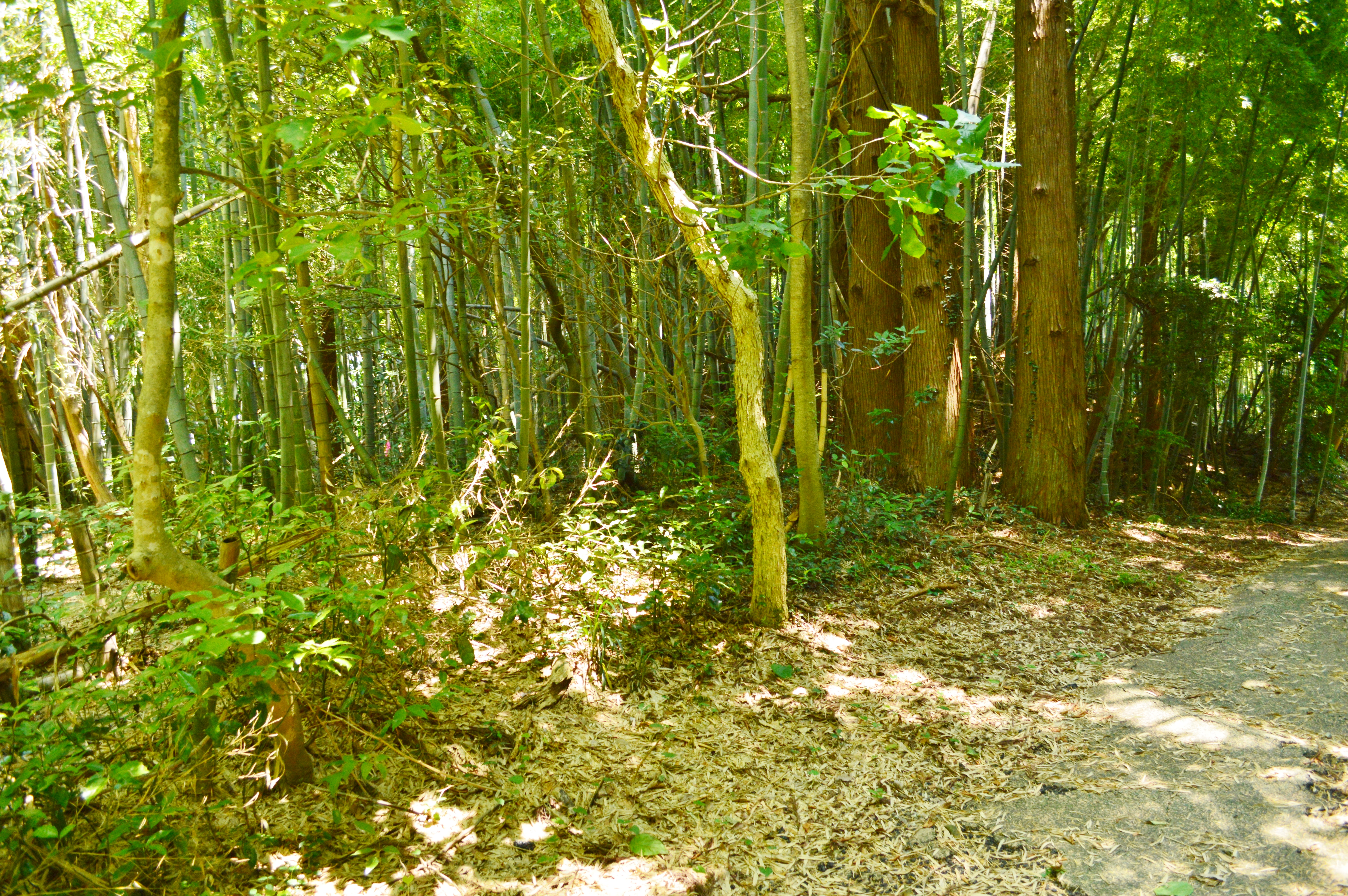 杉谷一番塚古墳 墳丘 Nikon D3200